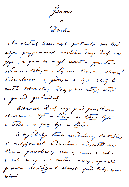 Genezis z Ducha. Modlitwa – autograf poematu autorstwa Juliusza Słowackiego.